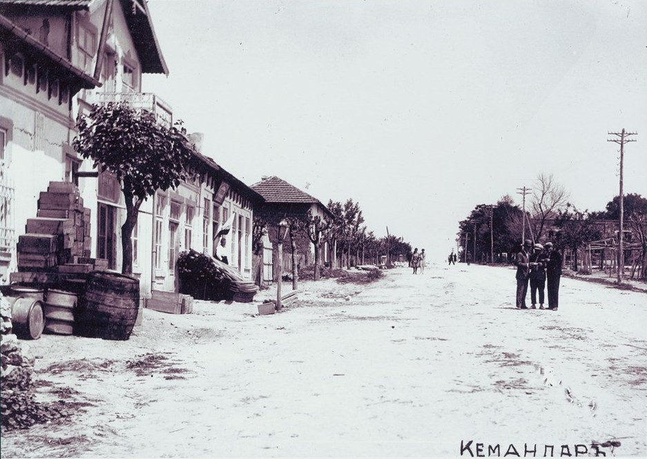 Изглед от с. Кеманлар (днес гр. Исперих), Разградско.